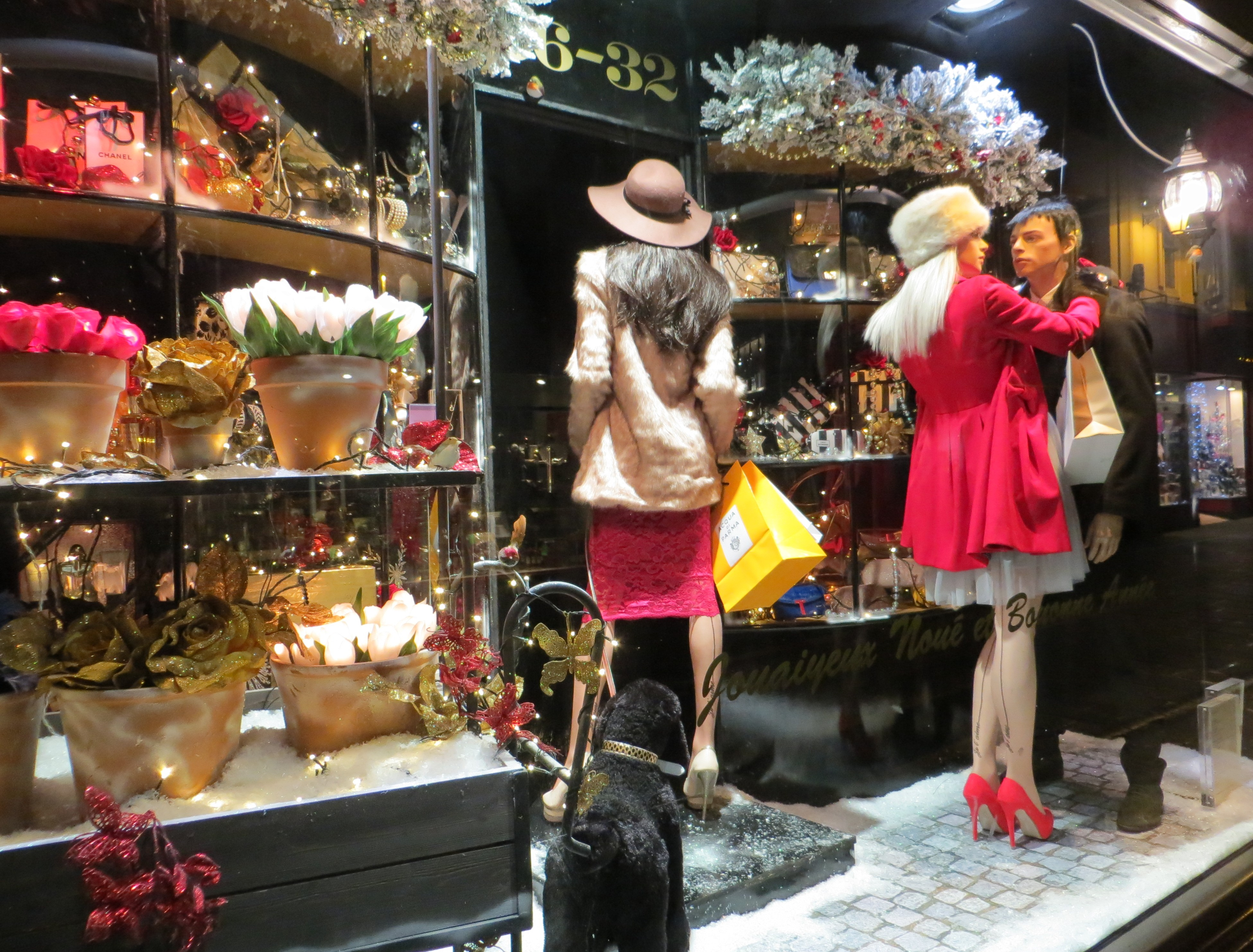 Nrf: Fête dé Noué, 2013